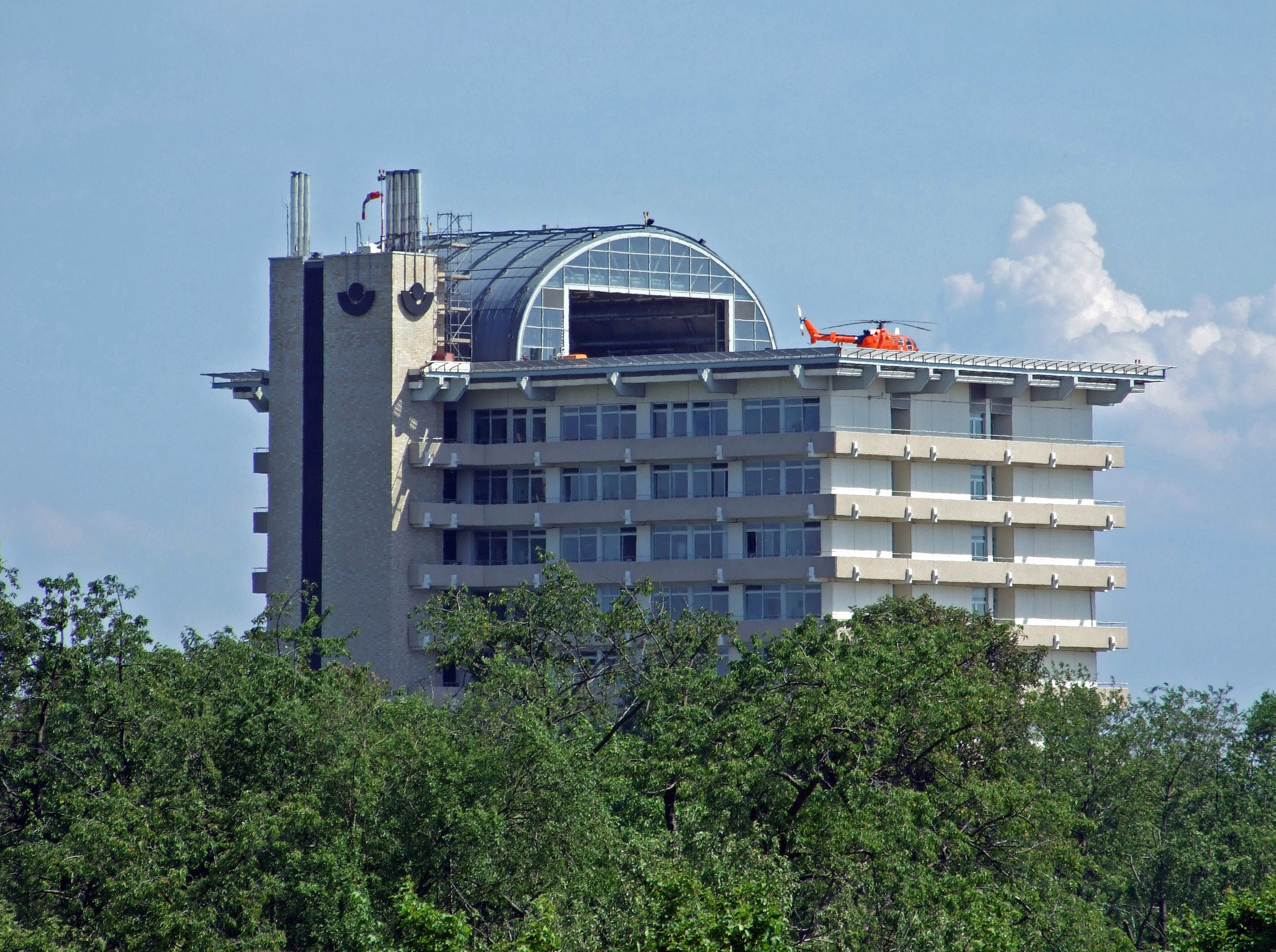 BG-Unfallklinik Ffm